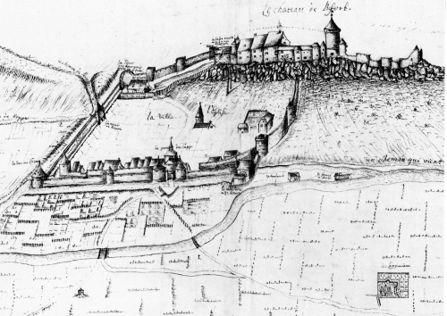 Ansicht von Schloß und Stadt Belfort